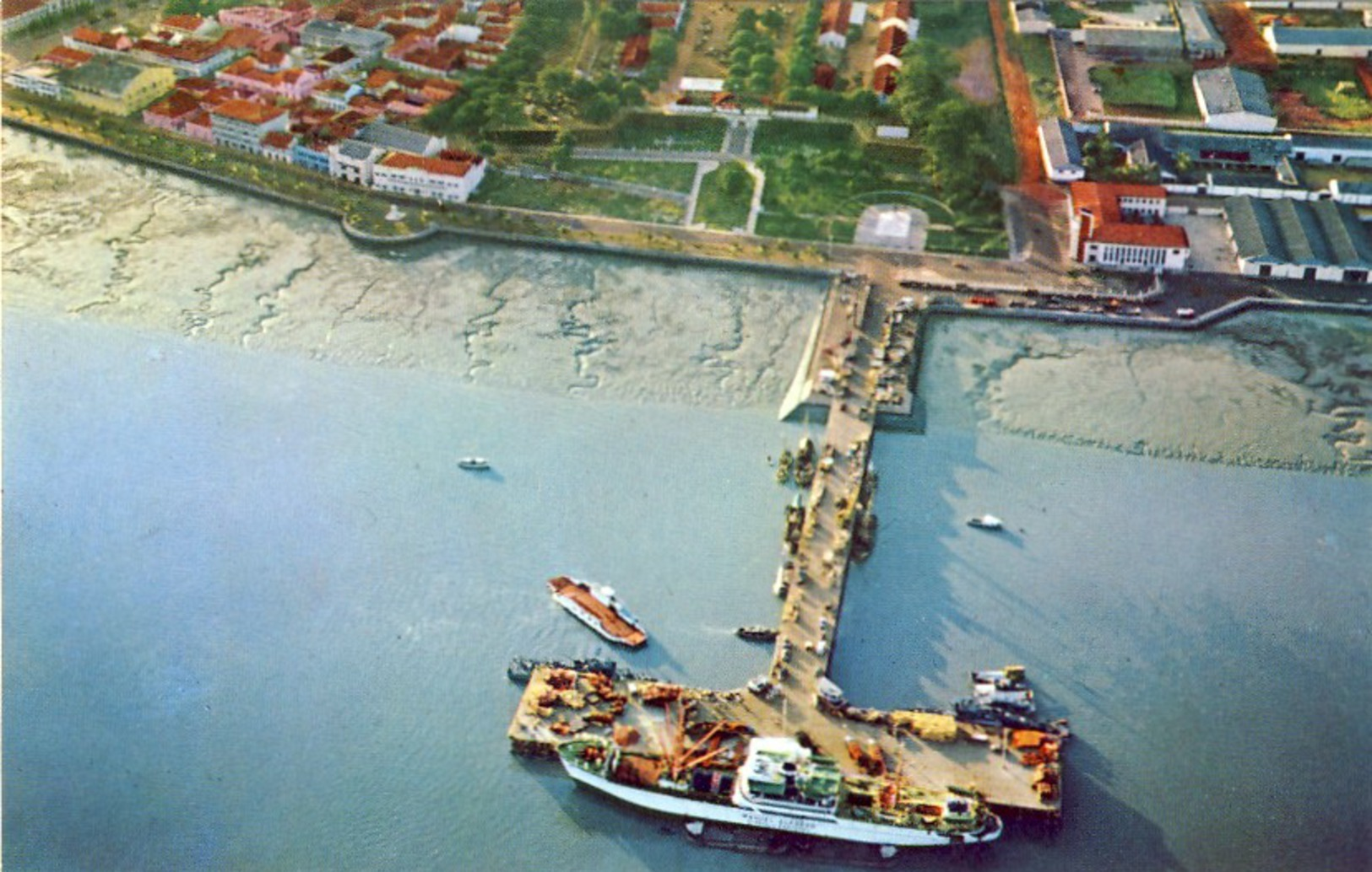 Postcard: Foto Serra No 119 - Vista aérea da Ponte-Cais - Bissau